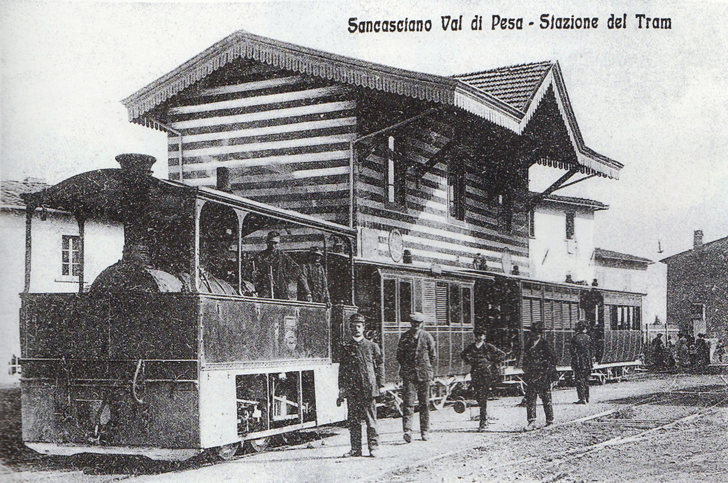 Stazione tranviaria di San Casciano in Val di Pesa